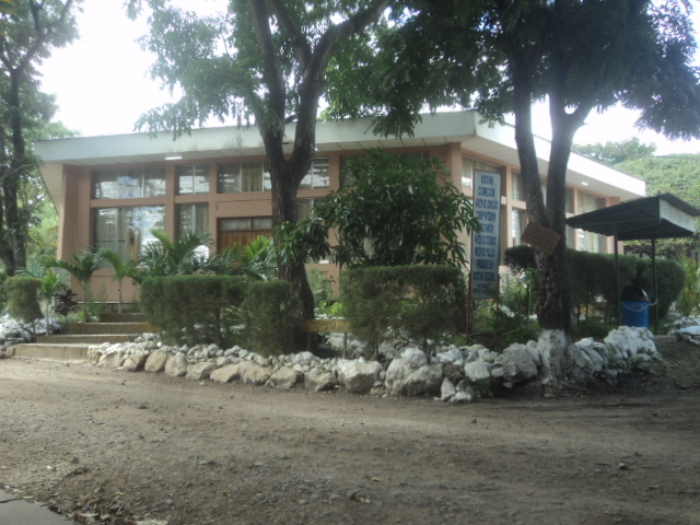 Universidade catolica